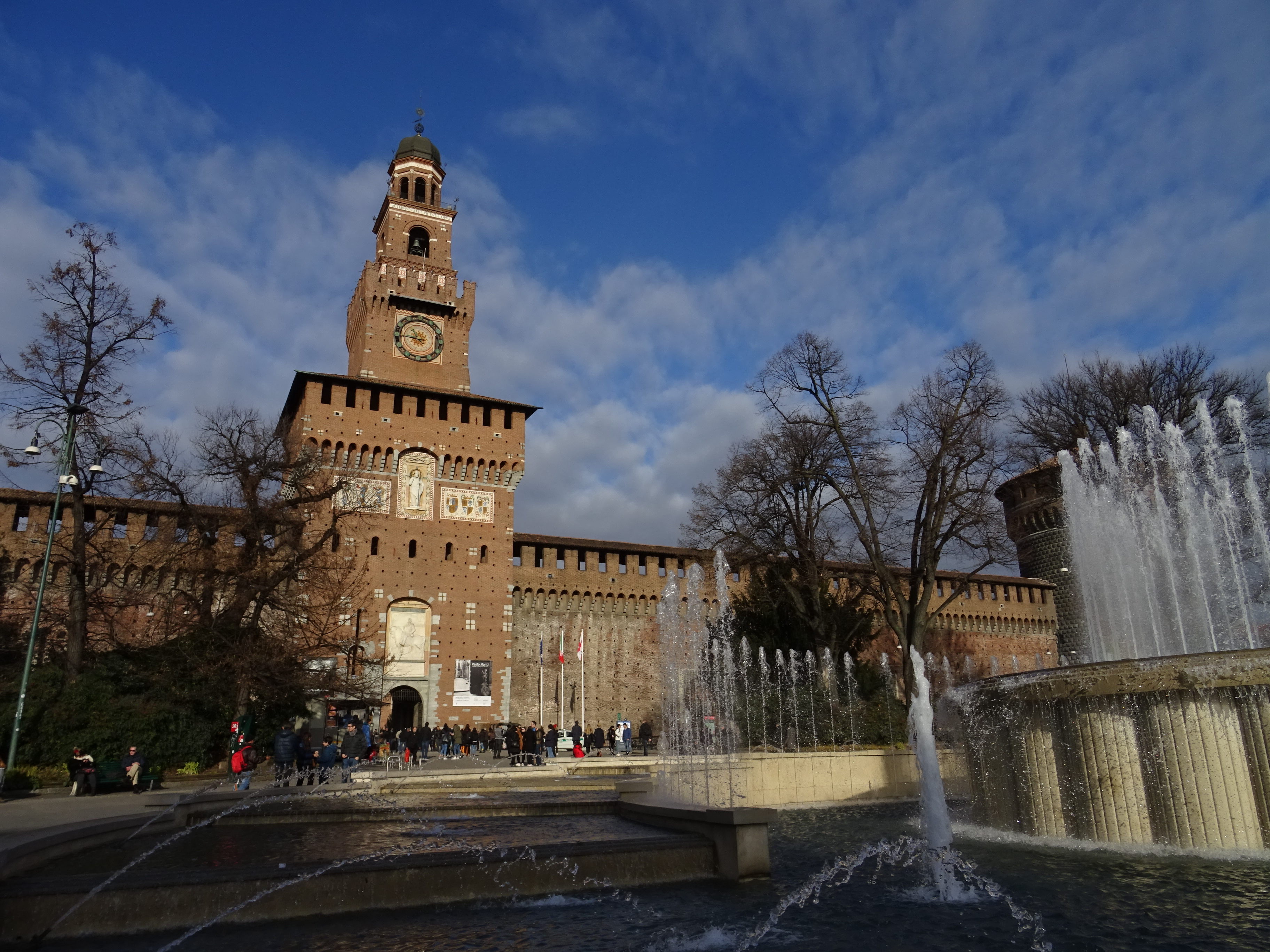 Castello Sforzesco, torre del Filarete